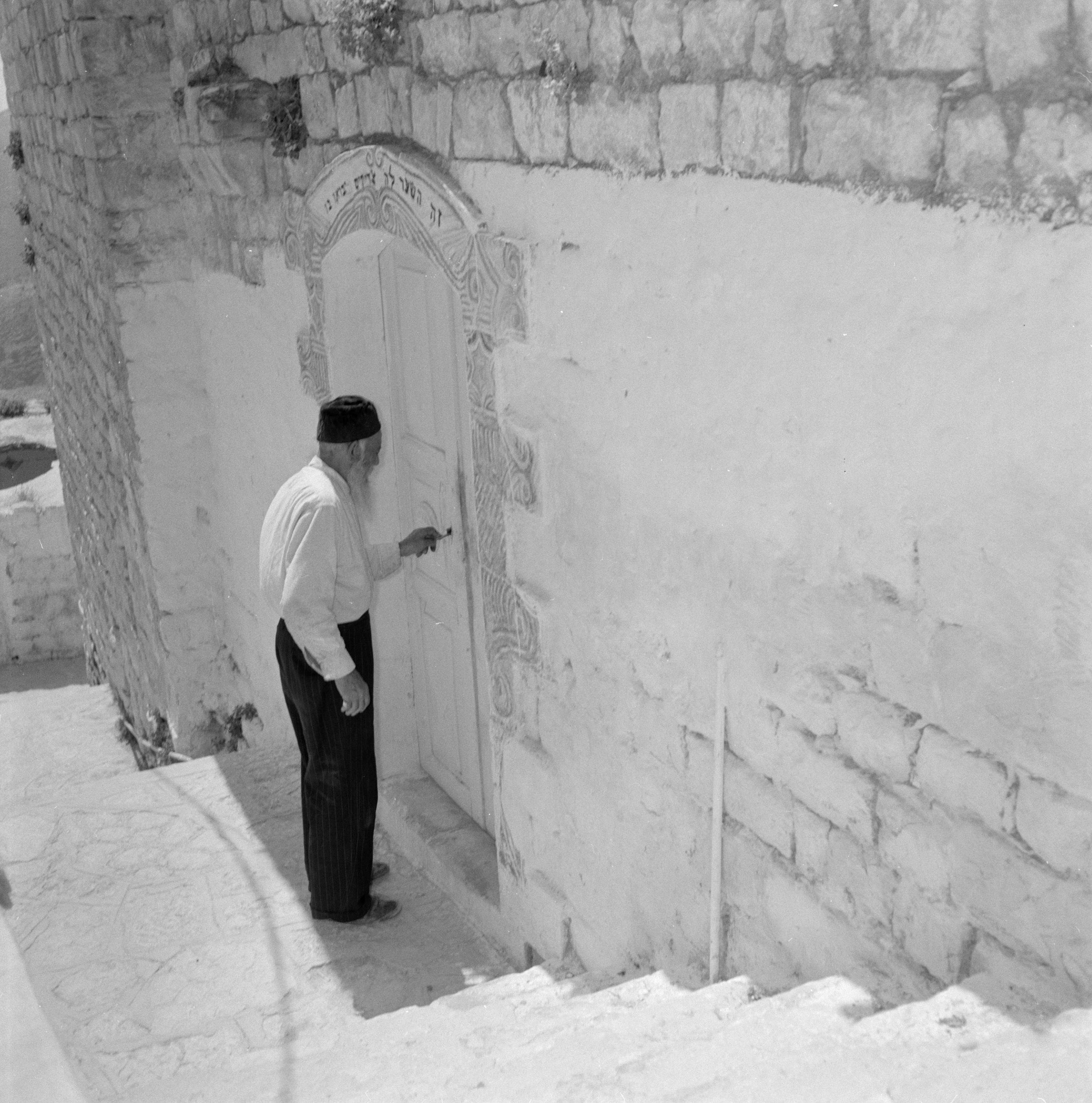 Collectie / Archief : Fotocollectie Van de Poll Reportage / Serie : [ onbekend ] Beschrijving : Rabbi Jozef van Bennea opent een deur van de Bana'asynagoge in Safad (Safed) Datum : ongedateerd Locatie : Israël, Safad, Safed Trefwoorden : architectuur, deuren, joodse religie, rabbijnen, synagogen Persoonsnaam : rabbi jozef Fotograaf : Poll, Willem van de Auteursrechthebbende : Nationaal Archief Materiaalsoort : Negatief (zwart/wit) Nummer archiefinventaris : bekijk toegang 2.24.14.02 Bestanddeelnummer : 255-4019